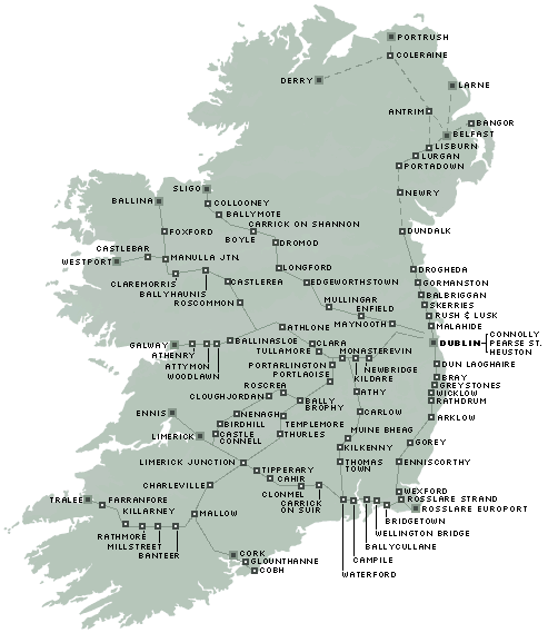 Iarn-rod Eireann (CIE ) 2006